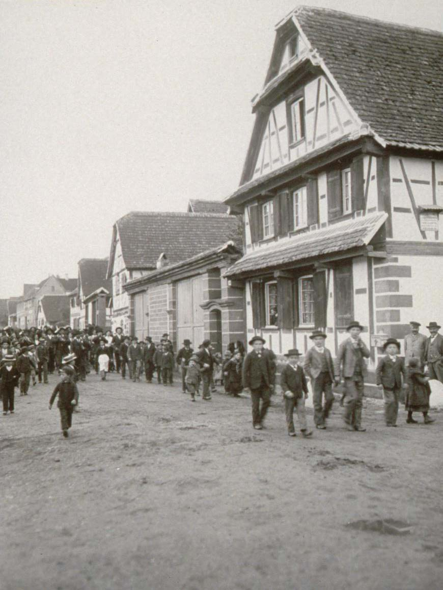 Défilé lors du Messti de septembre 1906, fête villageoise à Alteckendorf